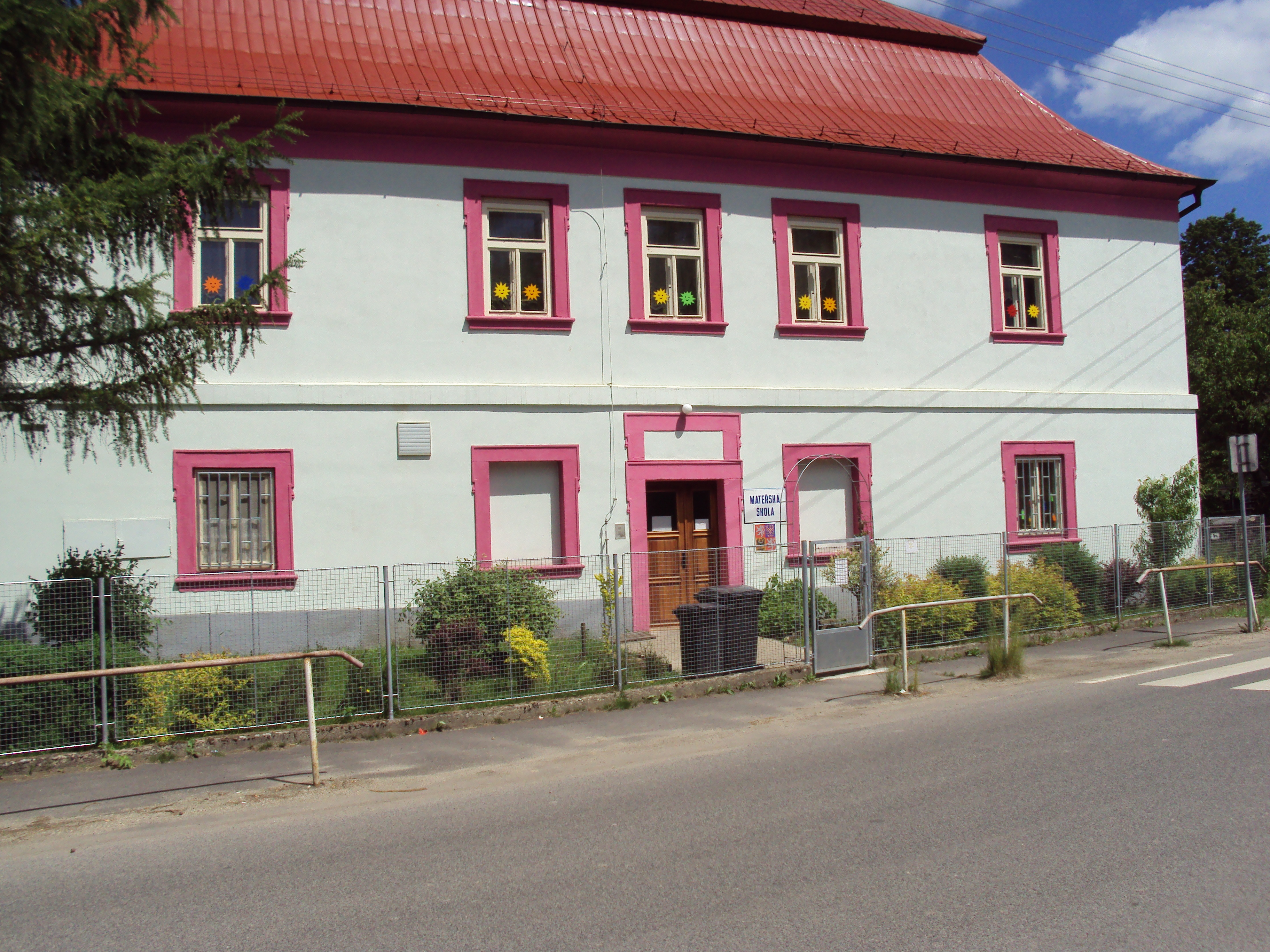 Mateřská školka v Dobranově u České Lípy